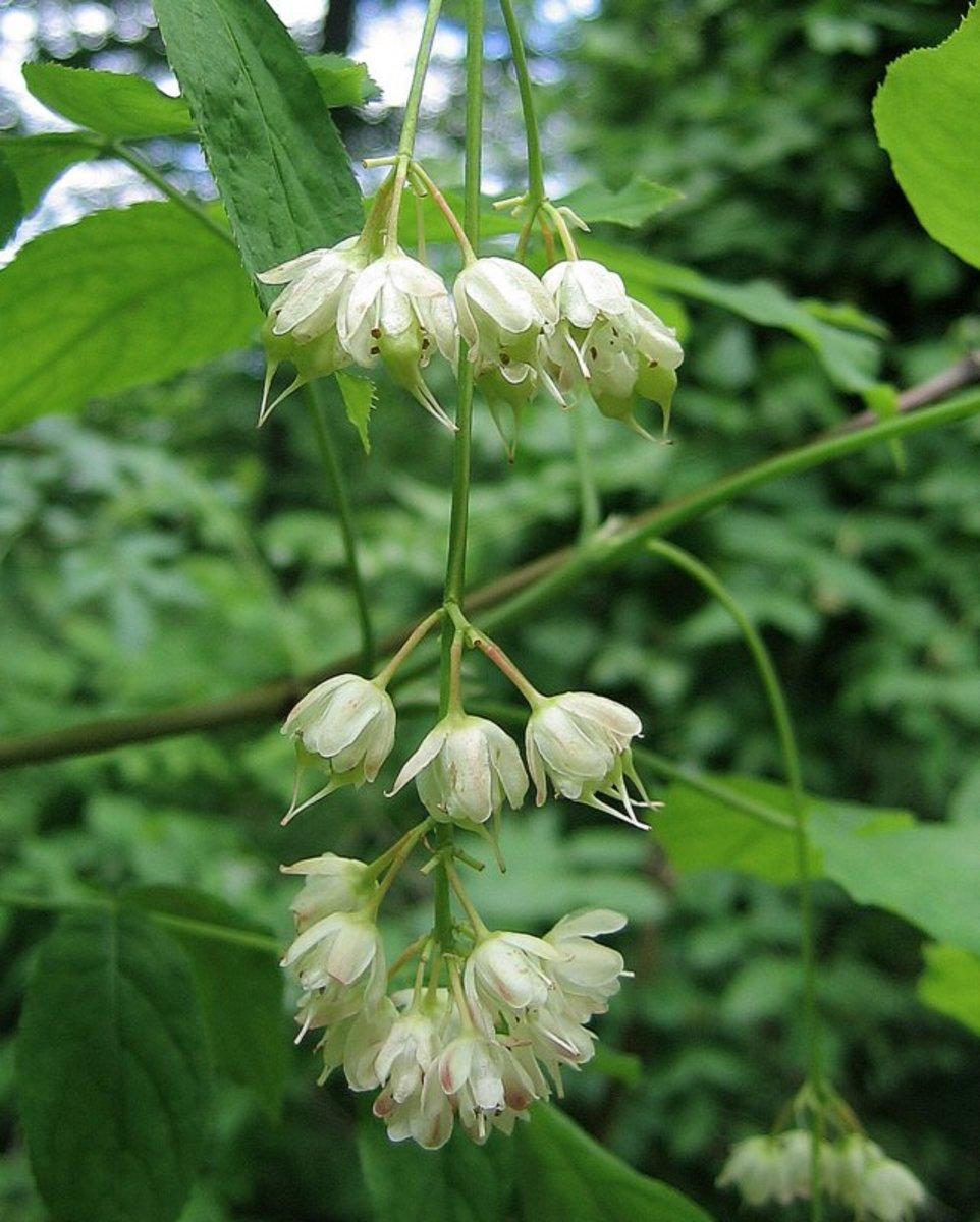 Navadni kloček na Slivnici.